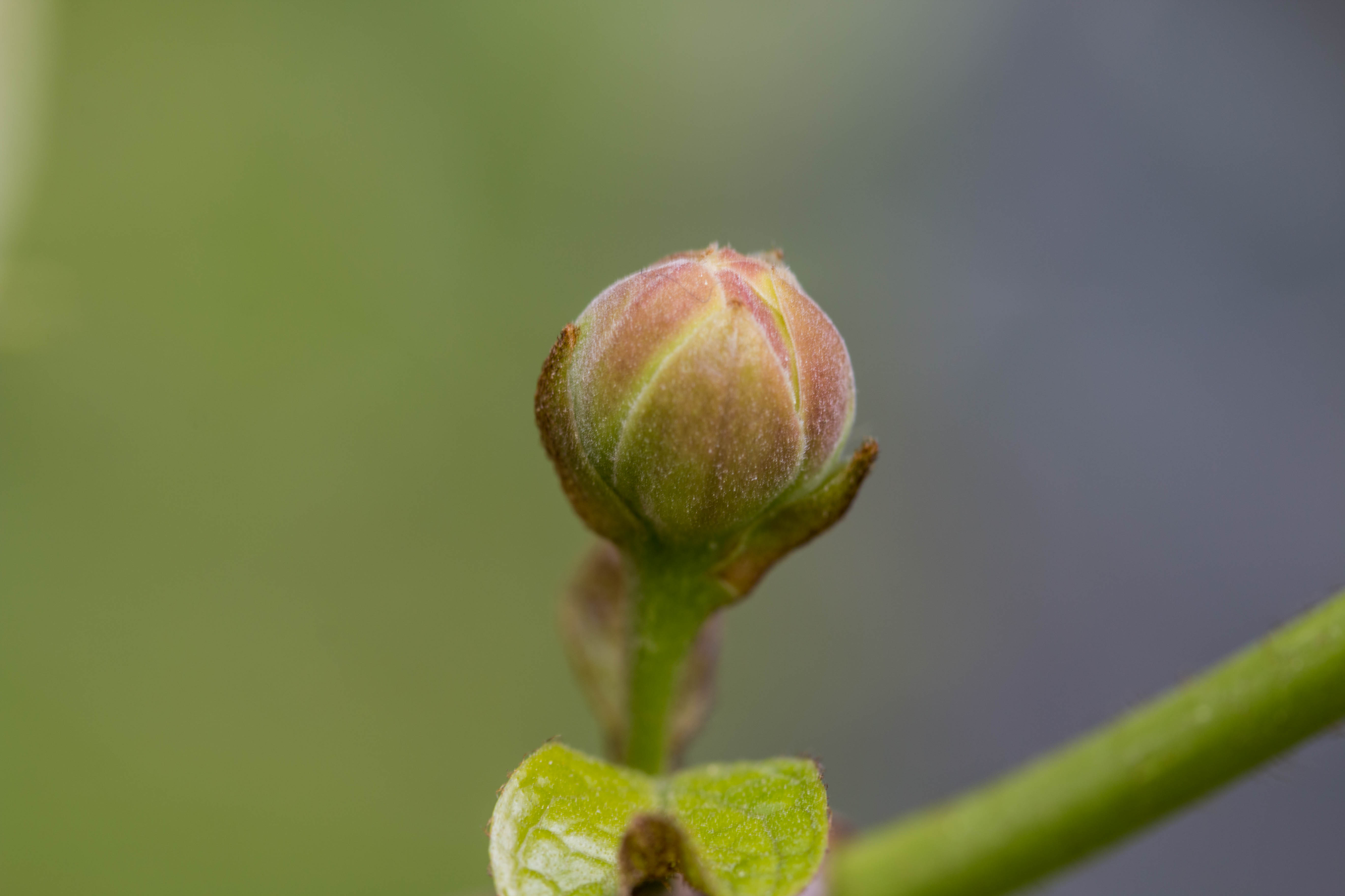 Knospe einer Sinocalycanthus chinensis